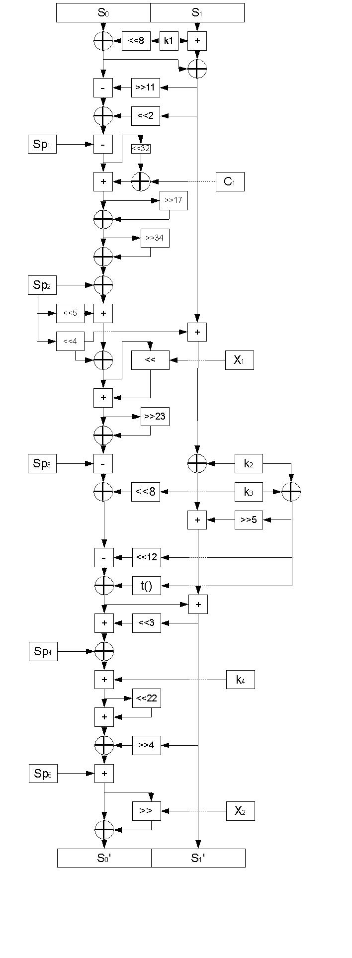 Раунд алгоритма HPC-Medium